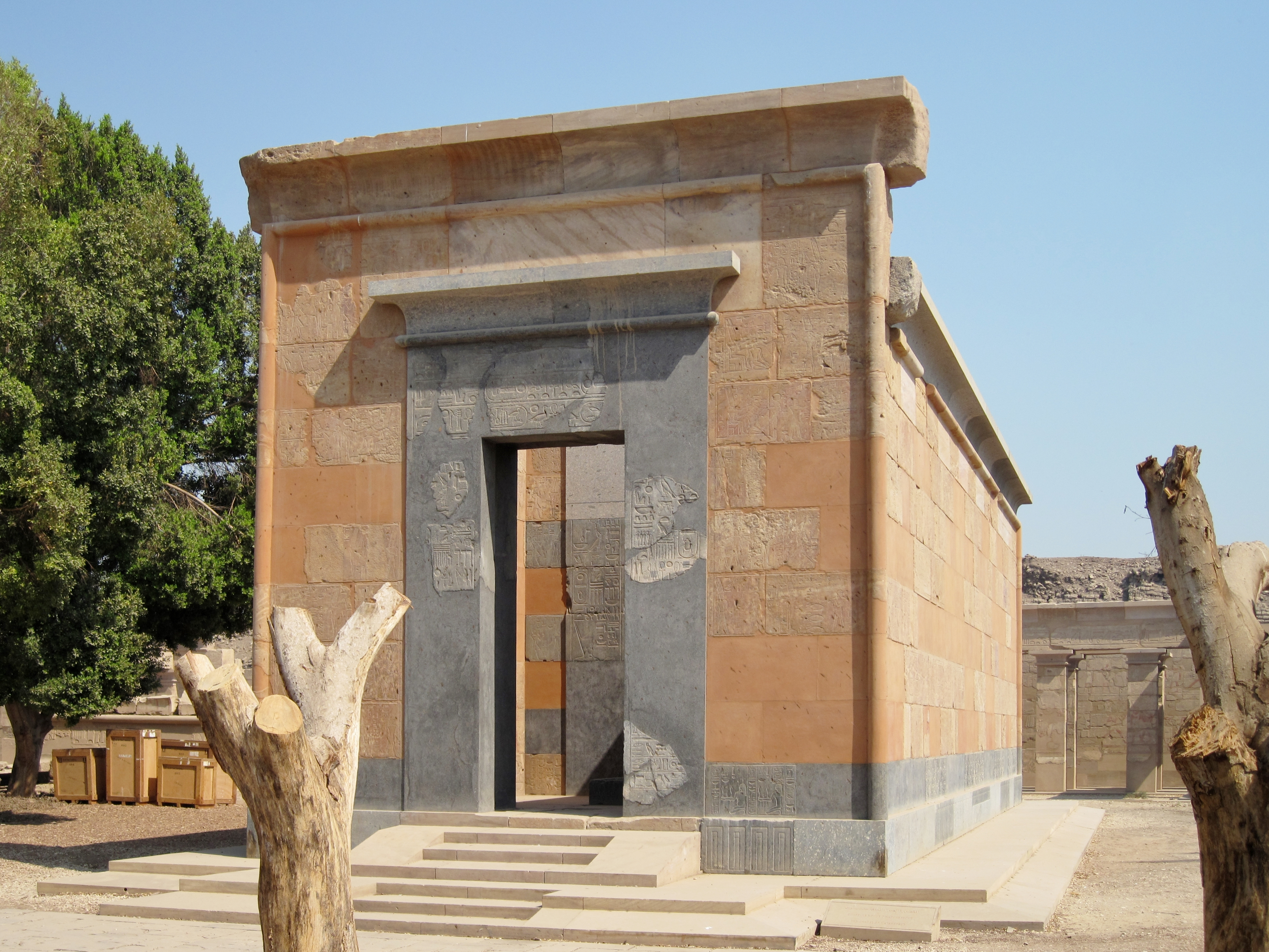 Im Jahr 2000 wiedererrichtete Rote Kapelle der Hatschepsut im Freilichtmuseum von Karnak, nördlich von Luxor, Ägypten